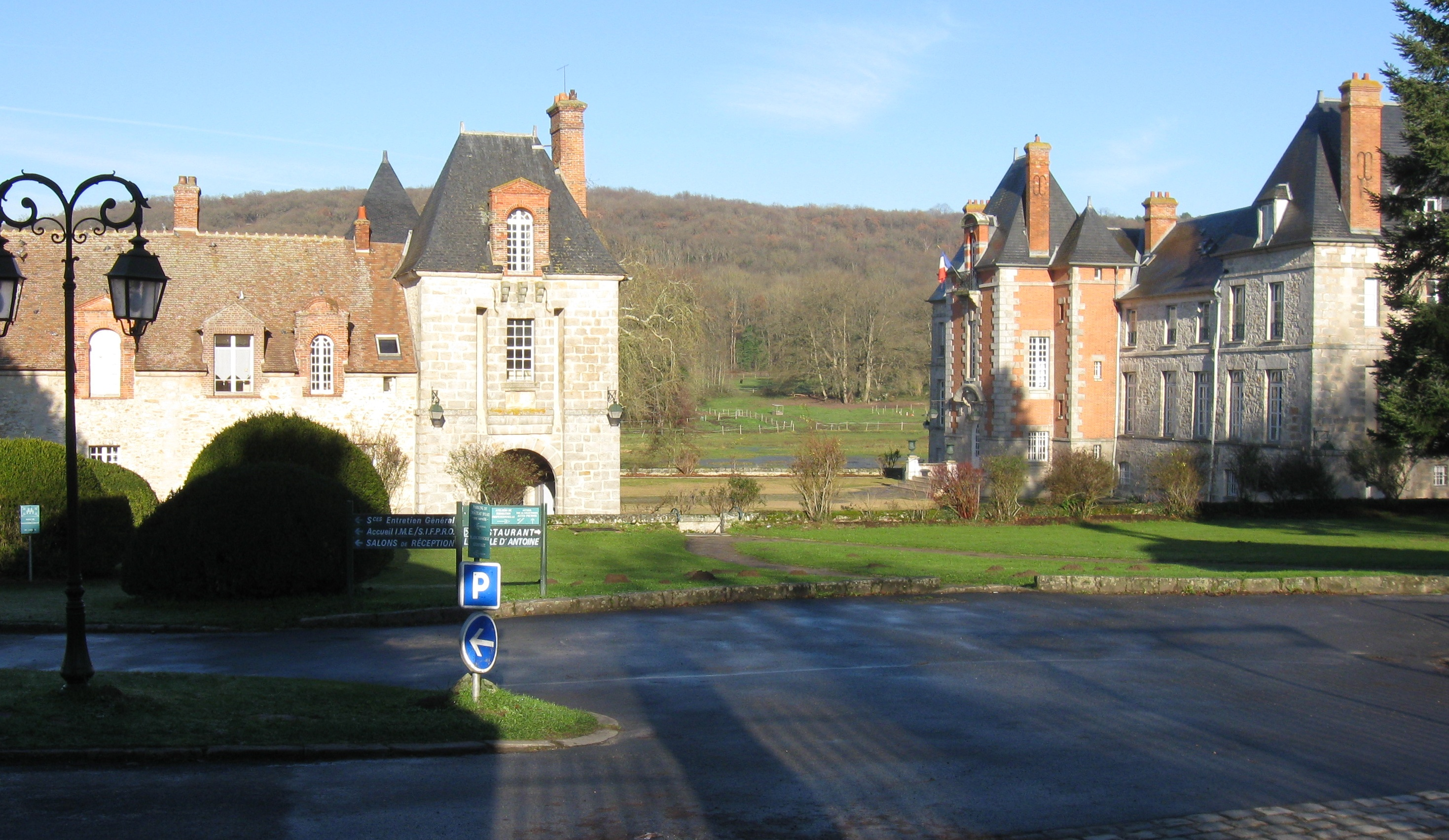 Château de Gillevoisin. (Janville-sur-Juine, Essonne, région Île-de-France).